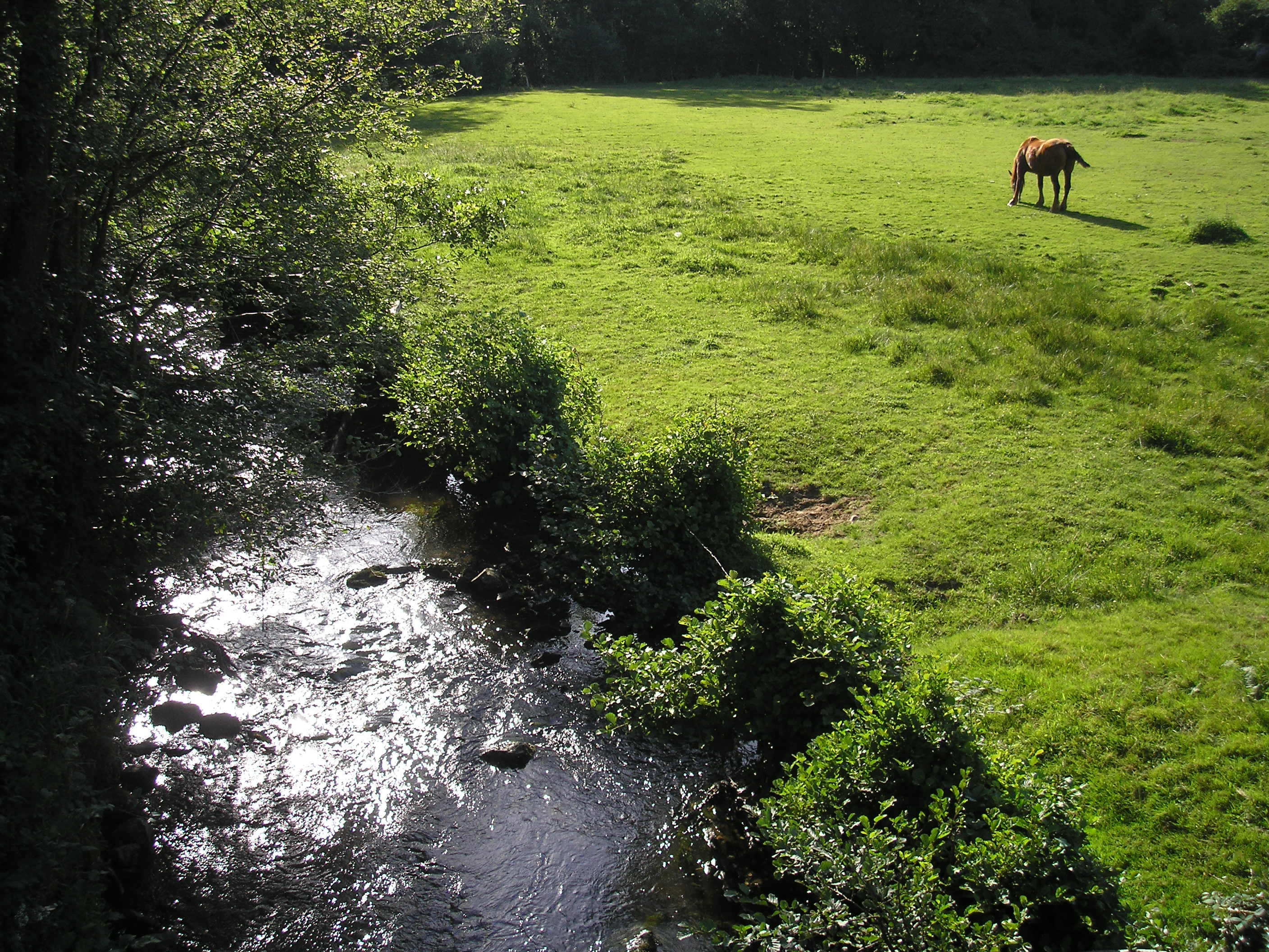 La Sonce à Saint-Georges-de-Rouelley (Normandie, France).